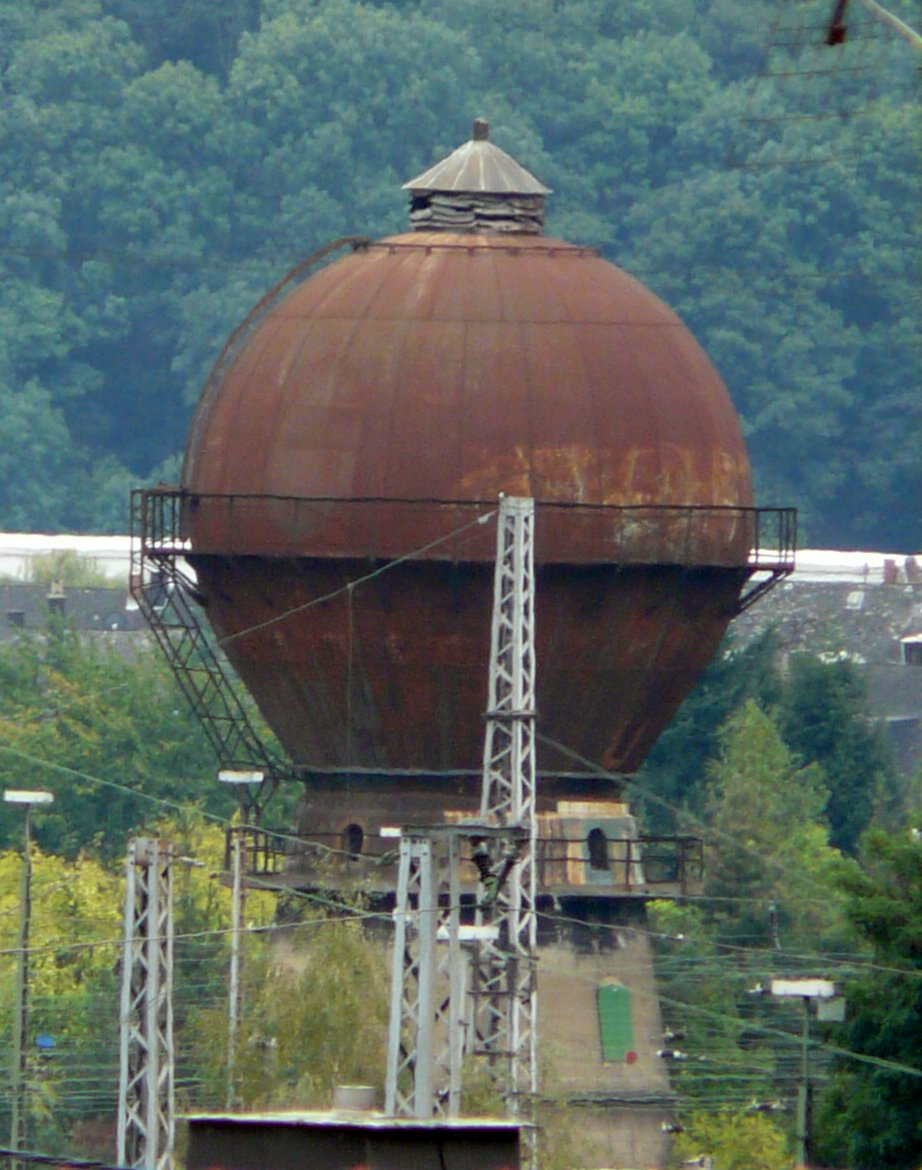 Trier-Ehrang, ehemaliges Bundesbahn-Betriebswerk, Wasserturm